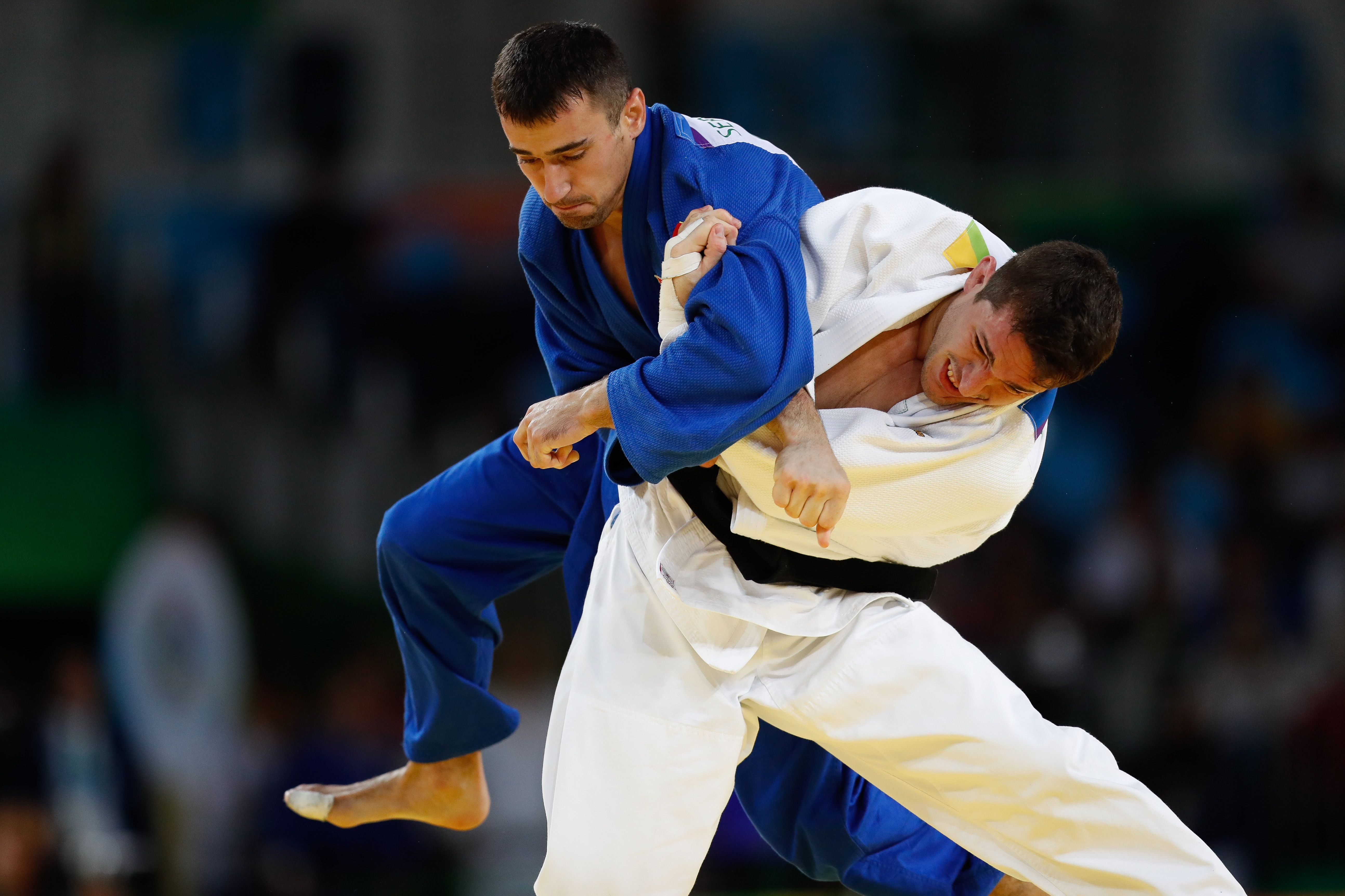 Judô na Arena Carioca dos Jogos Olímpicos Rio 2016 Rio de Janeiro - Victor Penalber, do Brasil, Г© eliminado por Sergiu Toma, dos Emirados ГЃrabes Unidos, na categoria atГ© 81kg do judГґ masculino na Arena Carioca dos Jogos OlГ­mpicos Rio 2016. (Fernando FrazГЈo/AgГЄncia Brasil)